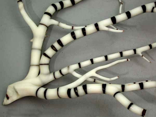 Dead bamboo coral Ceratoisis flexibilis (Anthozoa : Alcyonaria : Alcyonacea : Calaxonia : Isididae)